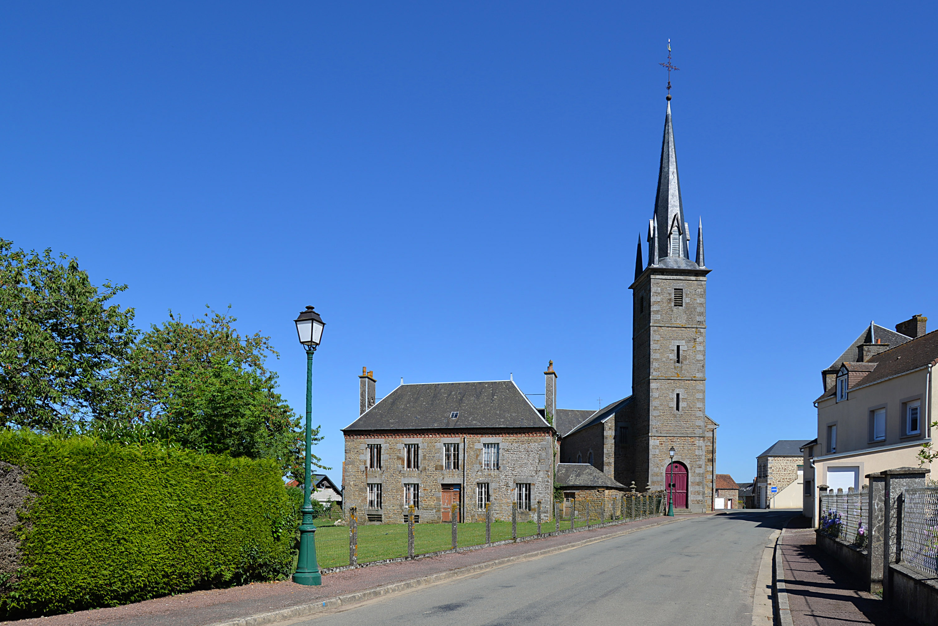 Landigou (Orne)